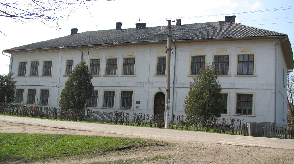 Нижньостанівецький ЗНЗ І-ІІІ ступенів